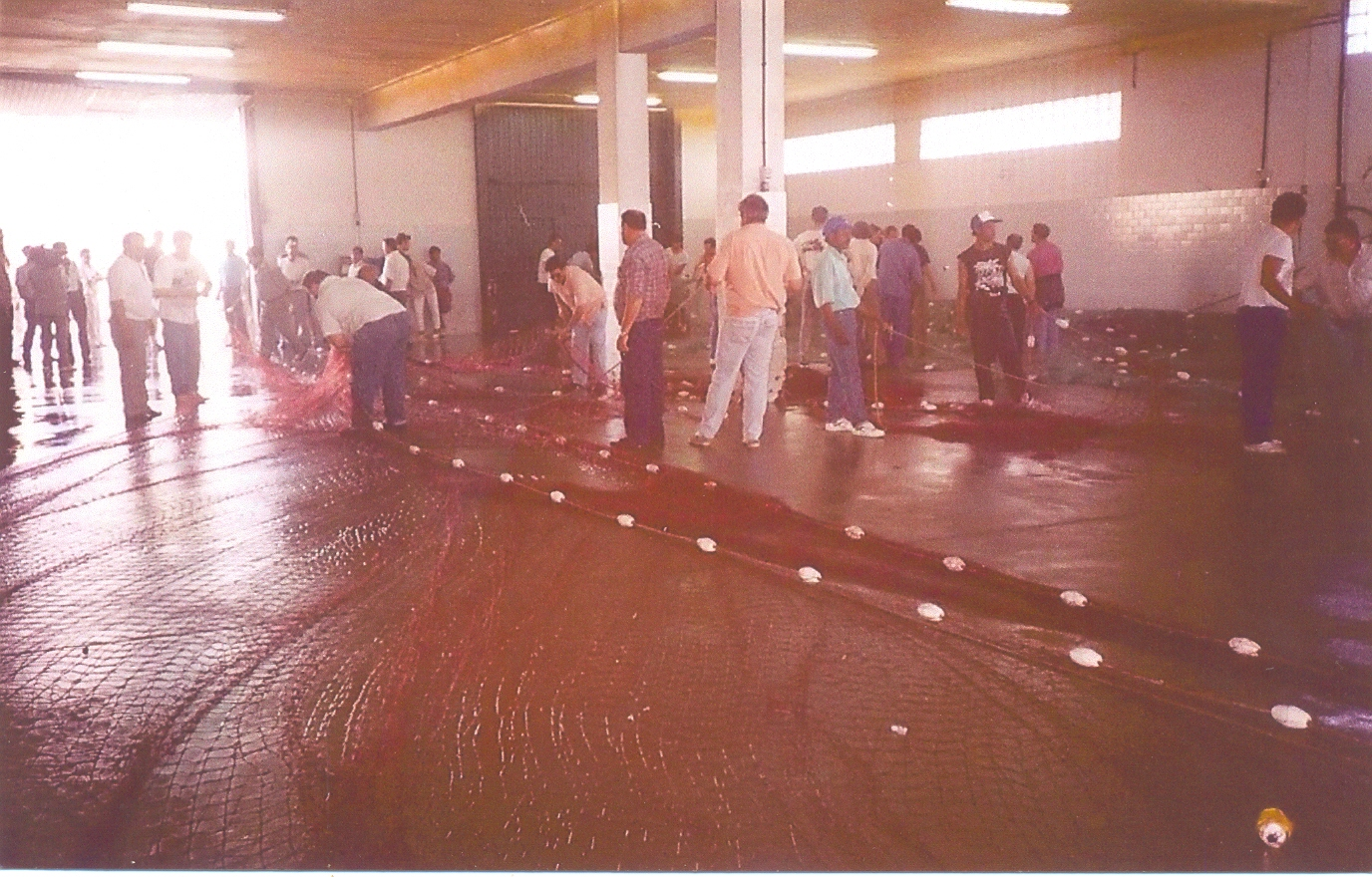 Pescadores midiendo redes de la Gabrile, durante la Guerra del Bonito.